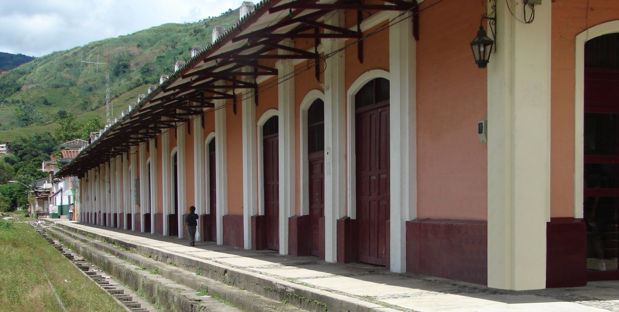 Antigua Estación del Tren, municipio de Cisneros, Antioquia, Colombia.ESTACION CISNEROS